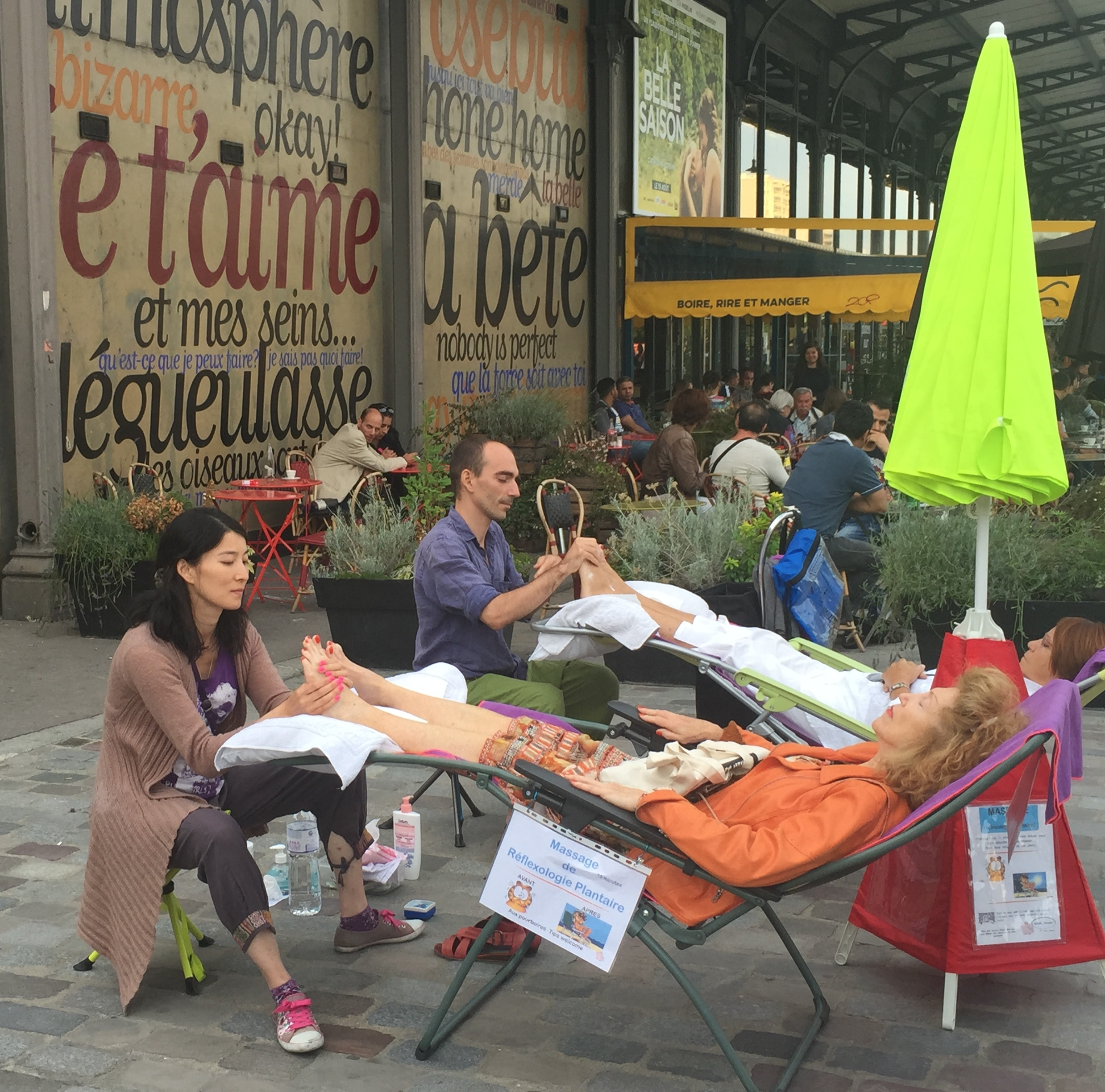 Image de Paris XIXe arrondissement en août 2015. This image was uploaded as part of L'Été des villes 2015.